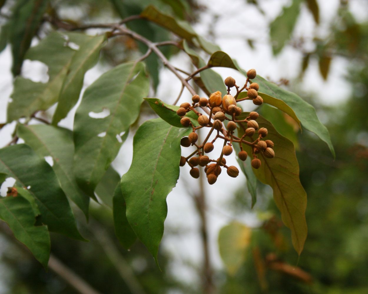 Vismia baccifera, Johanniskrautgewächse (Hypericaceae) - Costa Rica: Prov. Puntarenas, La Gamba NW Golfito, "Fila Trail" NW "Tropenstation La Gamba"/"Estación Biológica La Gamba"